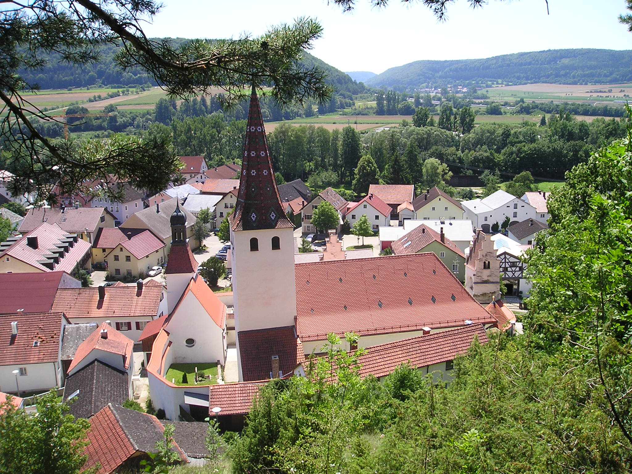 Kirchenburg Kinding im Landkreis Eichstätt